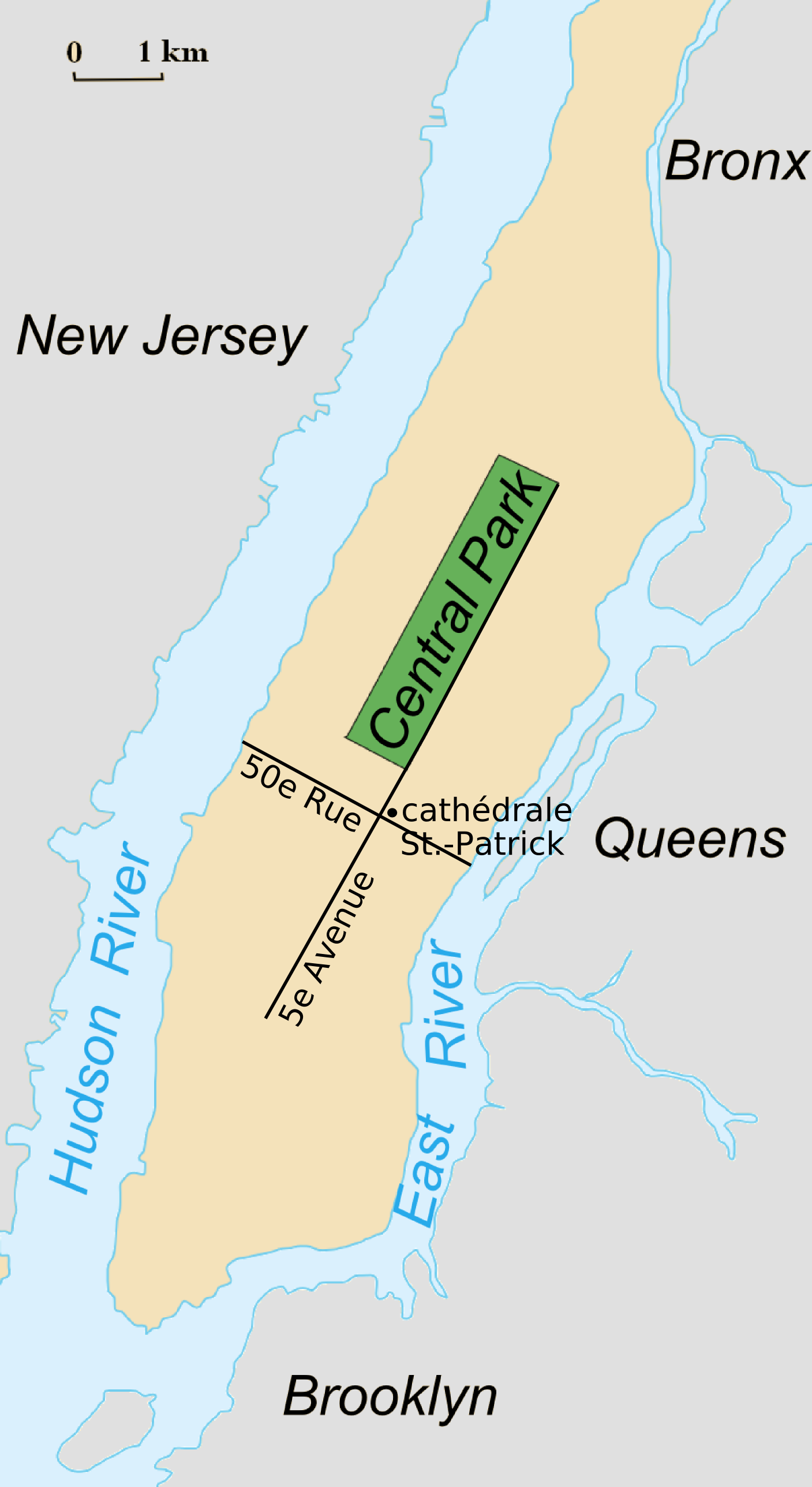 carte de localisation de la cathédrale St Patrick, New York.